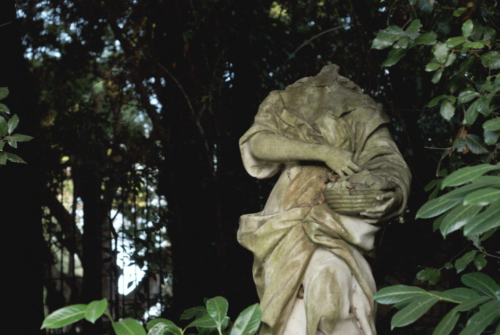 Una delle sculture che adornano la zona della Porta di Mezzo, da cui, attraverso cinque vialoni, si accede al parco vero e proprio.